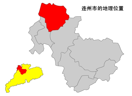 内容介绍：连州市在清远地图上的标示 原创者：zhuwq 创作日期：2005年1月 创作方法：将广东地图用扫描仪输入电脑，再将图片导入FLASH，用画笔描出轮廓，着填充，删除原图片，导出JPG图象便大工告成，这样制作的优点是，开始辛苦了点，但绘制别的市便替换颜色即可。